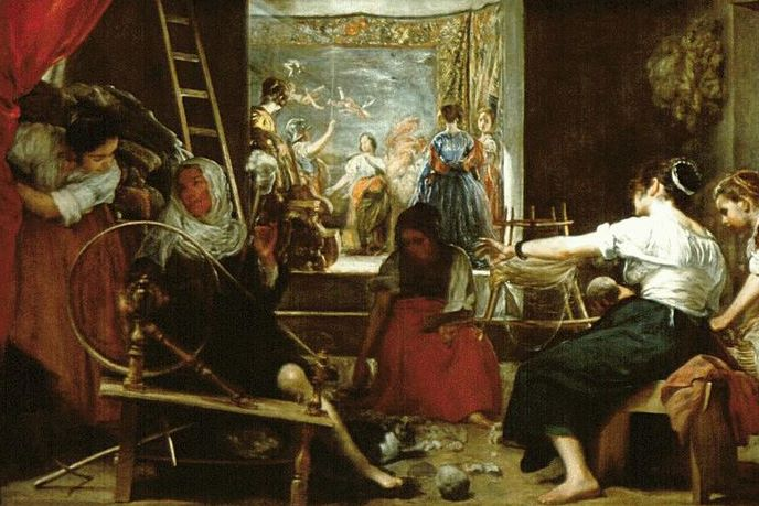 La obra representa el momento en que la tejedora Aracne fue convertida en araña por la diosa Atenea, y es una de las obras mitológicas más conocidas del pintor sevillano Diego Velázquez.